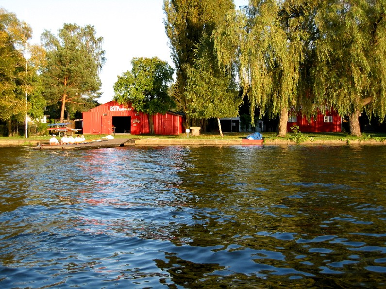 Gelände des Ruder-Verein "Preußen" e.V. Berlin am Niederneuendorfer See